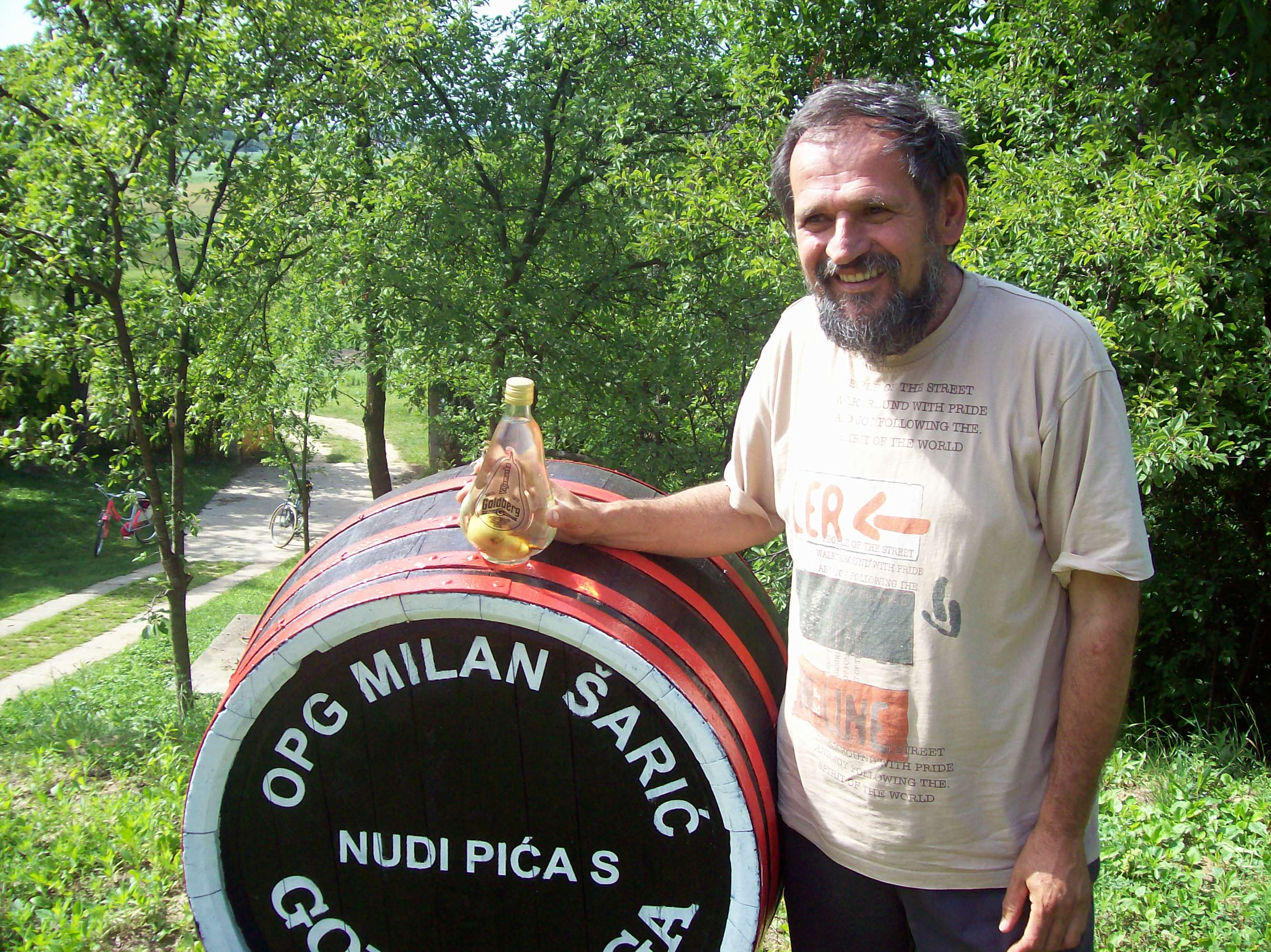 Milan Šarić, matematičar iz Kneževa